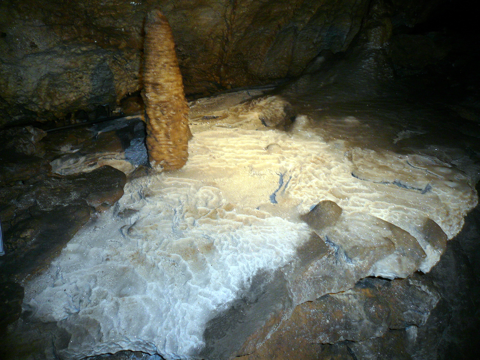 Heinrichshöhle